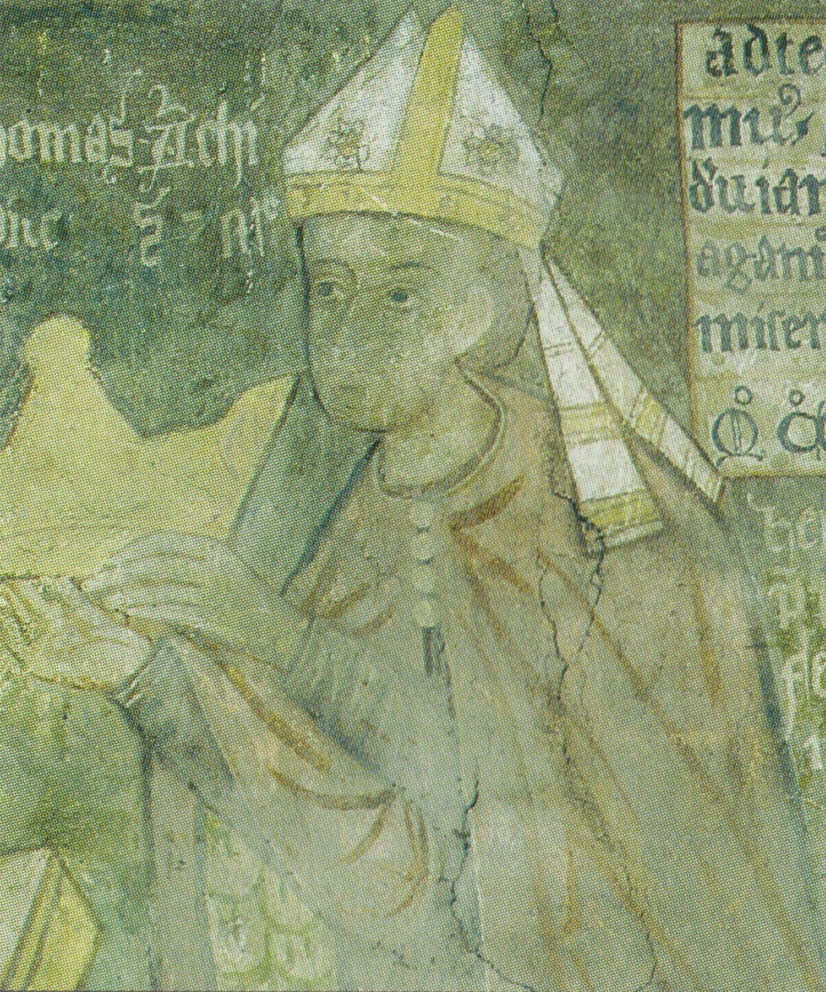 (II.) Tamás esztergomi érsek korabeli ábrázolása a szepeshelyi Szent Márton-székesegyházban; Károly Róbert megkoronázását ábrázoló freskó részlete